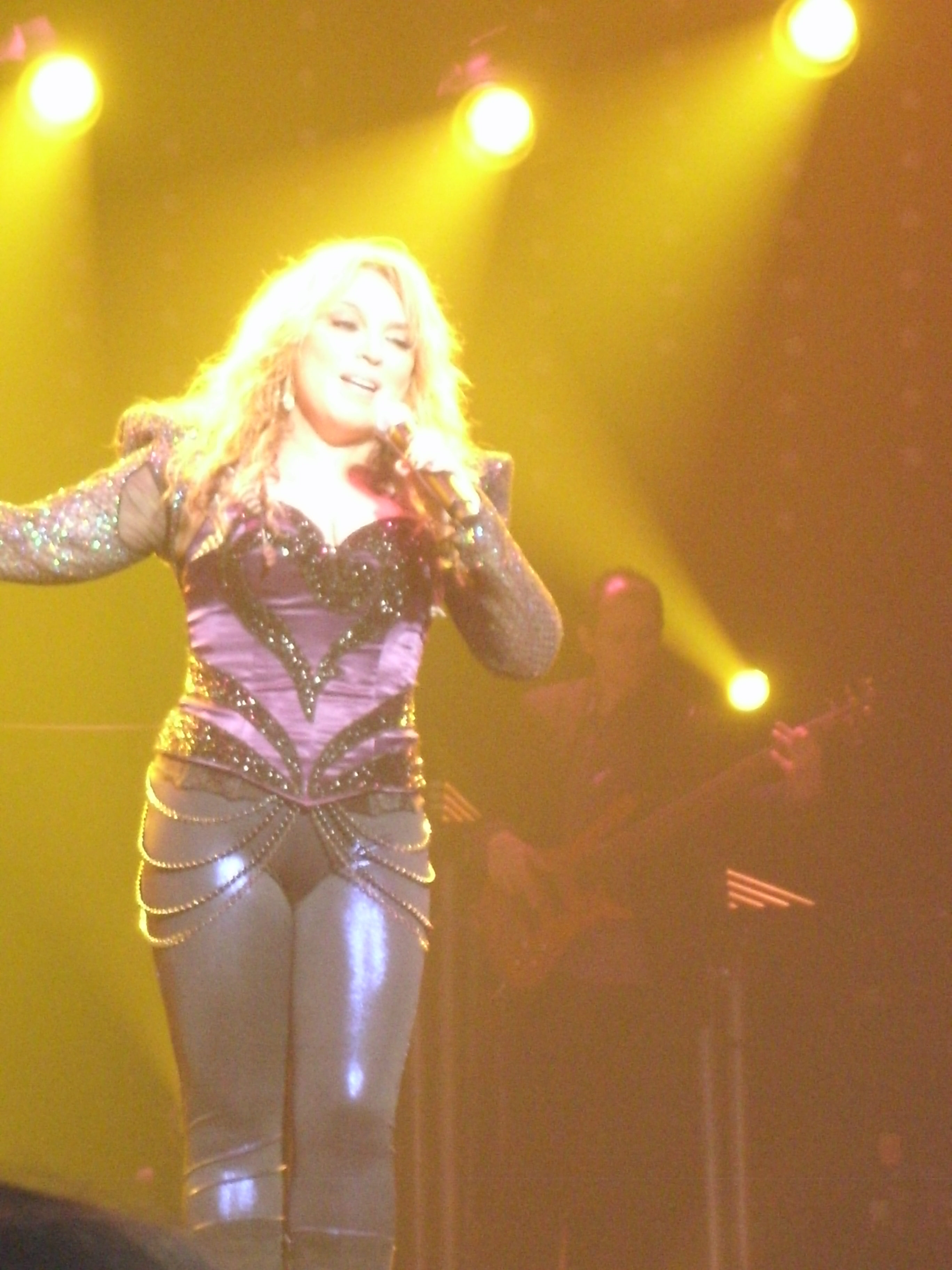 Ednita Nazario cantando en su concierto del 8 de mayo de 2010